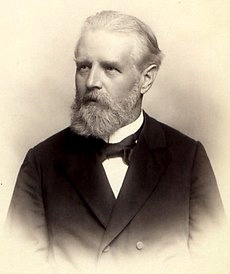 Porträt des Oberkirchenrates Albert Bacmeister